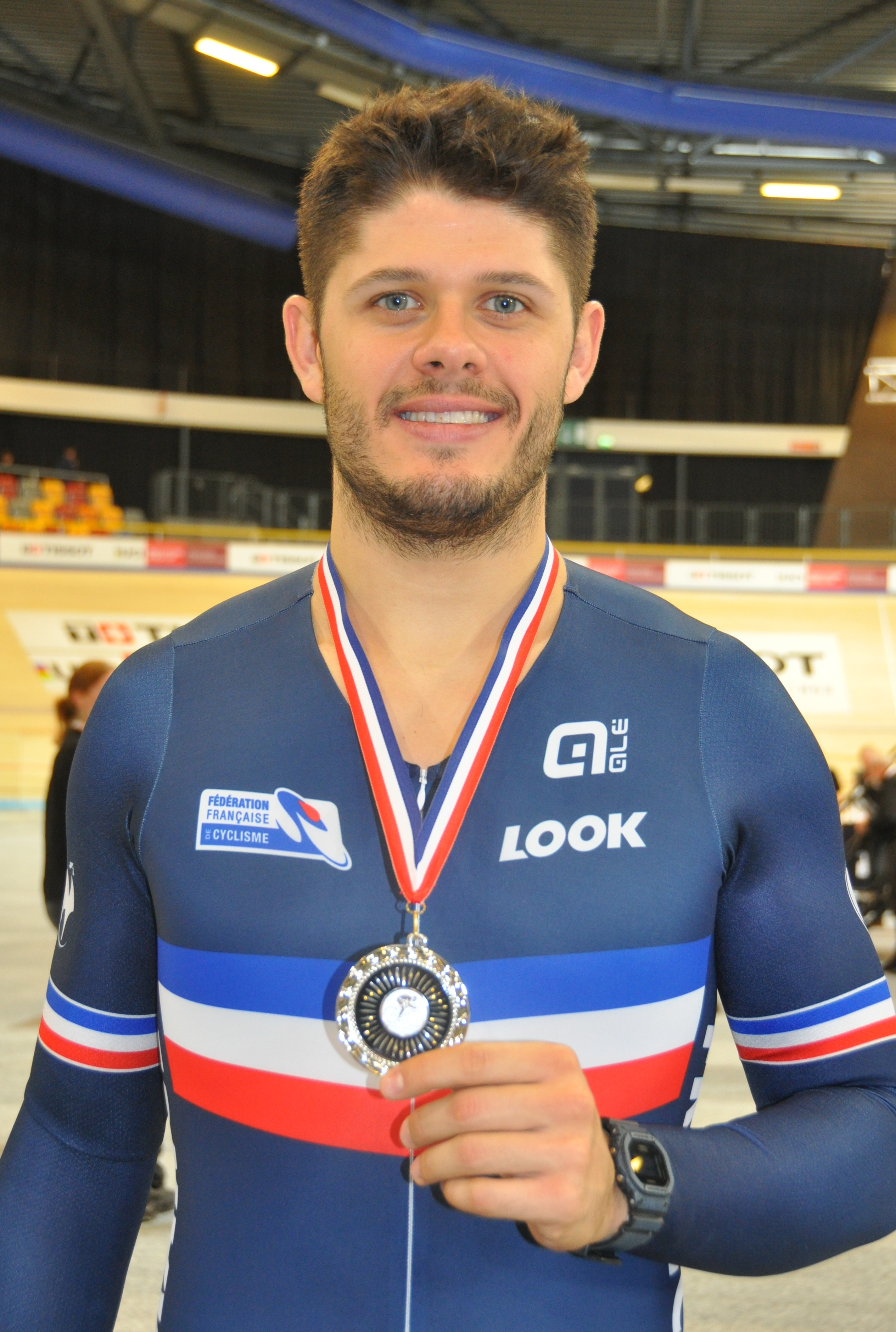 Quentin Lafargue, französischer Radsportler, Silber im Teamsprint